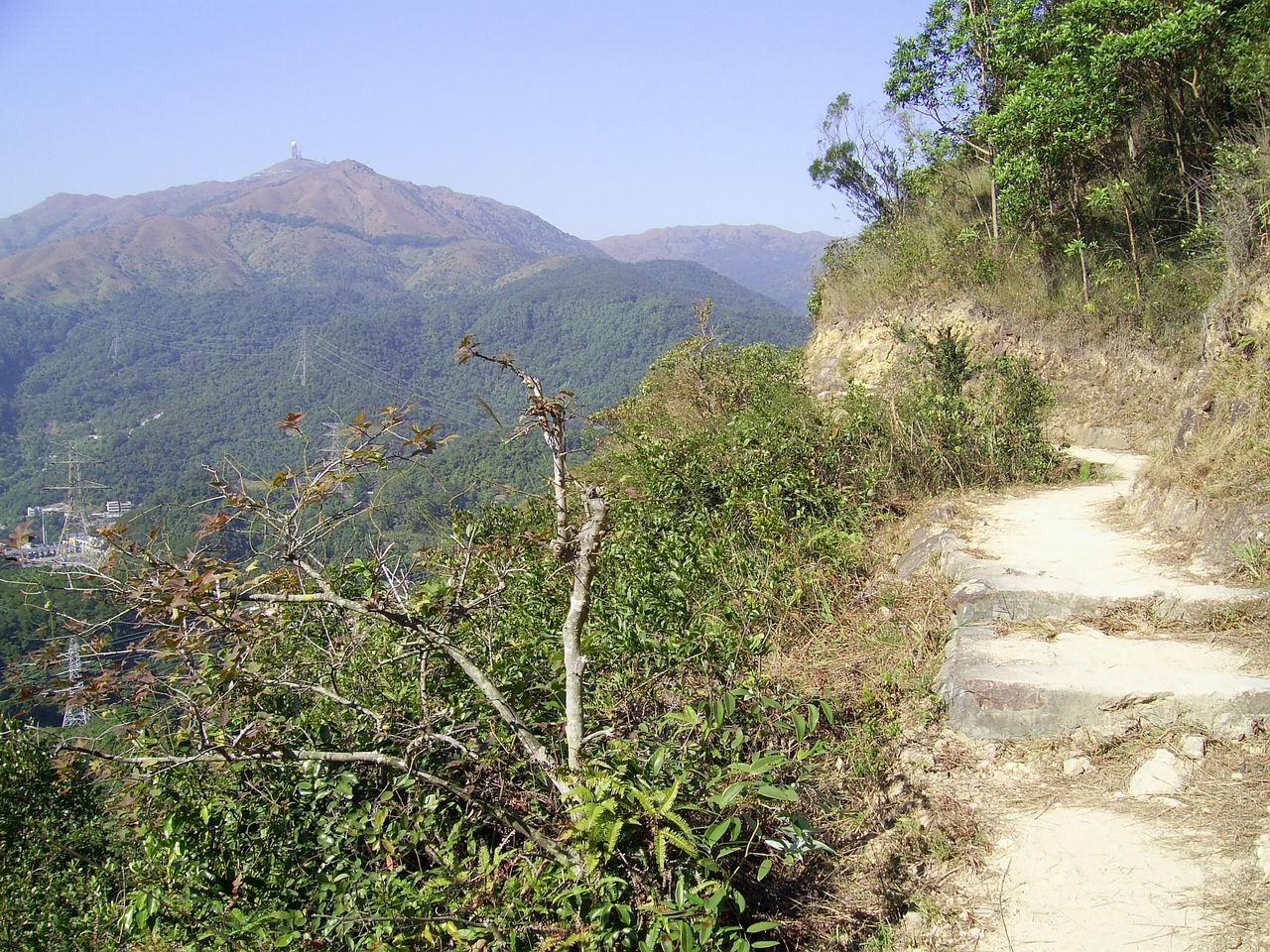 走私坳山徑